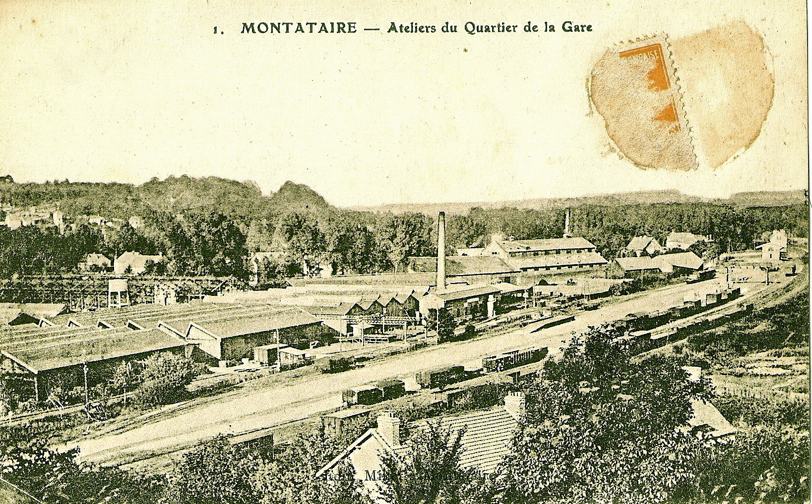 Carte postale ancienne éditée par Millet (?) à Montataire, N°1MONTATAIRE : Ateliers du quartier de la Gare